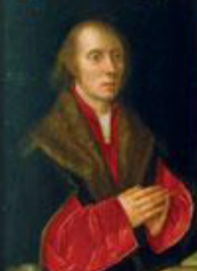 Hinrich Kerckring (* 1479; † 12. Januar 1540), Lübecker Ratsherr. Ausschnitt aus einem Altarbildnis.